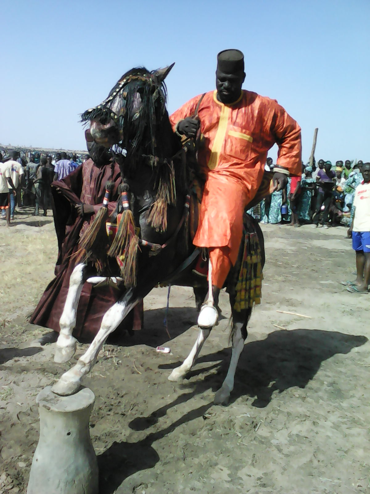 Concours wikichallenge écoles d'afrique 2019